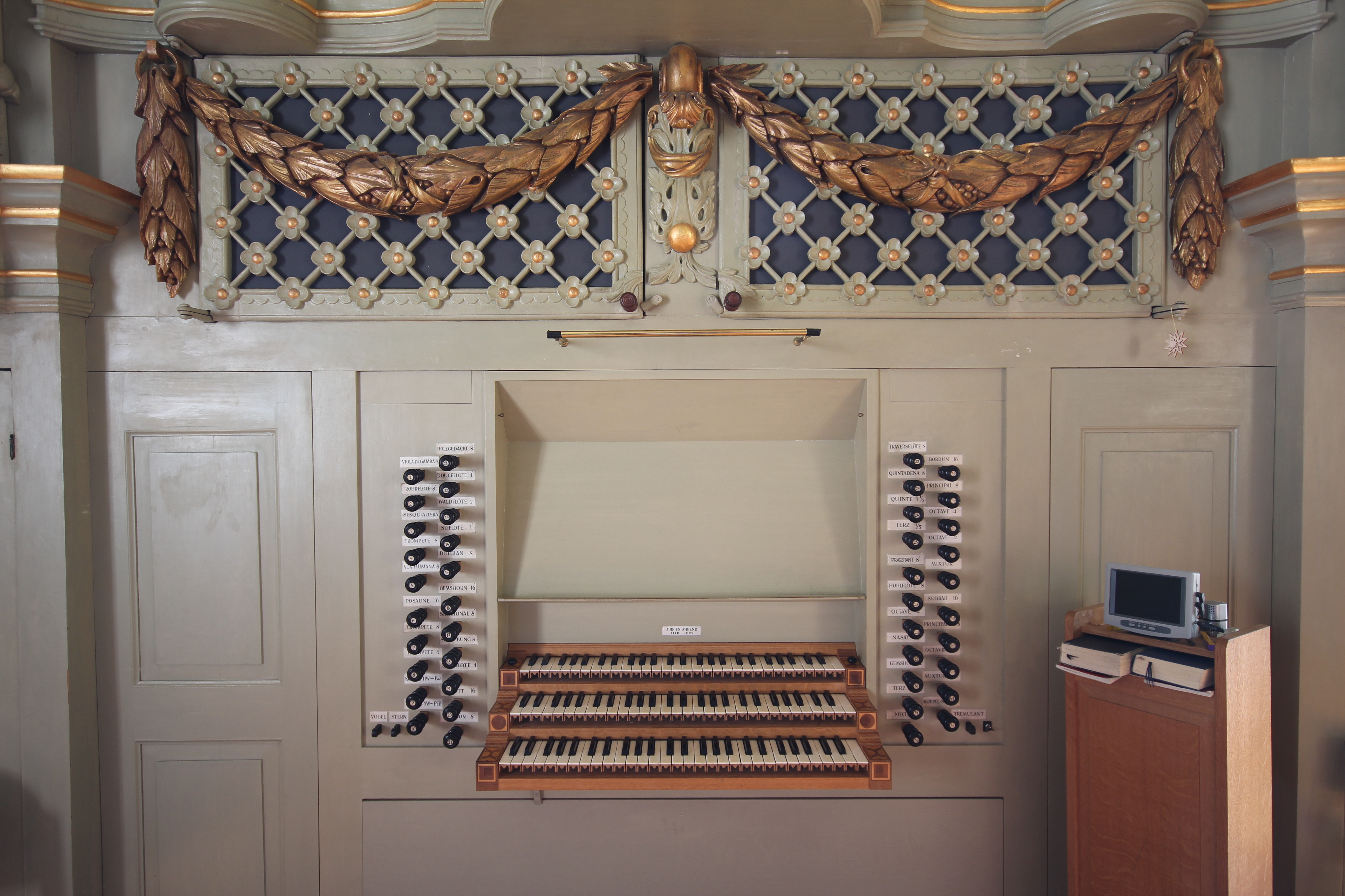 Spieltisch der Jürgen-Ahrend-Orgel der Lutherkirche zu Leer (Ostfriesland) im Gehäuse von Hinrich Just Müller aus dem Jahr 1795